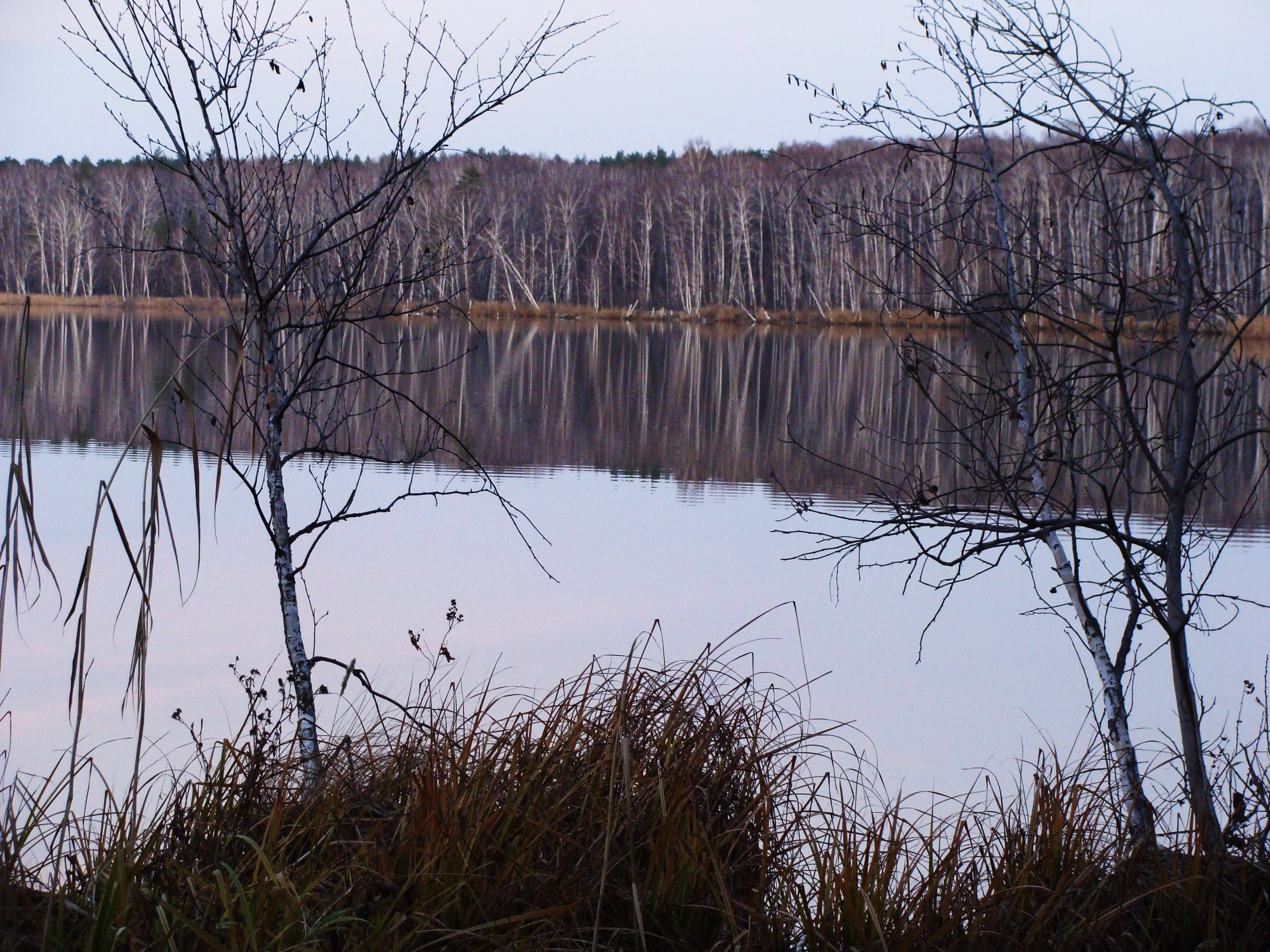 Озеро Селезян, Еткульский район This image is related to the protected area of Russia number 7410092